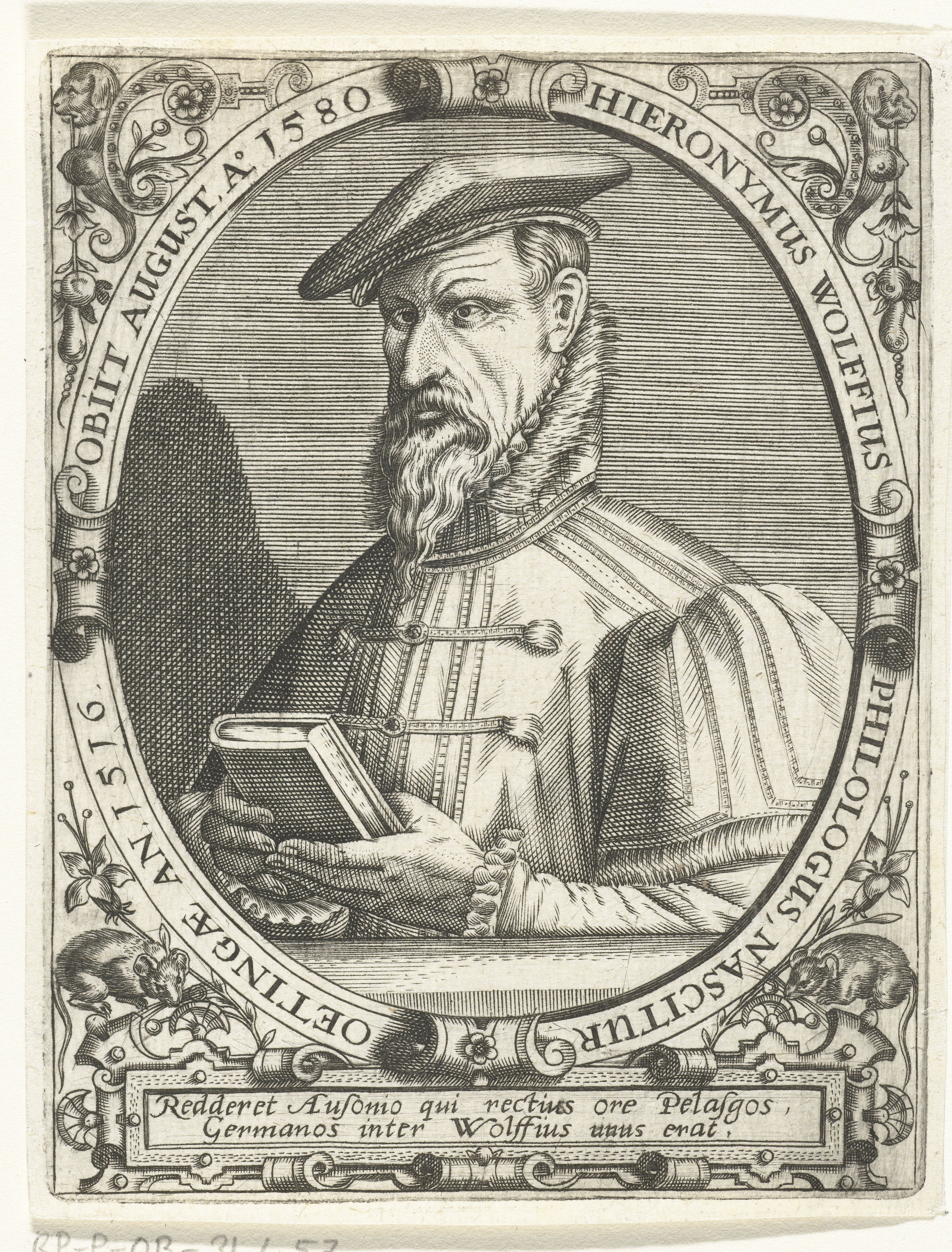 IdentificatieTitel(s): Portret van Hieronymus WolfHieronymus Wolffius (titel op object)Objecttype: prent boekillustratie Objectnummer: RP-P-OB-31.457Catalogusreferentie: Singer 98247Opschriften / Merken: verzamelaarsmerk, verso, gestempeld: Lugt 2228Omschrijving: Portret van de bibliothecaris Hieronymus Wolf, in ovaal met randschrift. Onder het portret een lofdicht.VervaardigingVervaardiger: prentmaker: Theodor de Brynaar ontwerp van: Jean Jacques Boissard (mogelijk)Plaats vervaardiging: Frankfurt am MainDatering: ca. 1597 - ca. 1599Fysieke kenmerken: gravureMateriaal: papier Techniek: graveren (drukprocedé)Afmetingen: plaatrand: h 140 mm × b 100 mmToelichtingGemaakt voor: J.J. Boissard, Icones virorum illustrium doctrina &c eruditione praestanti um contines. Frankfurt am Main: de Bry, 1597-1599.OnderwerpWie: Hieronymus WolfVerwerving en rechtenVerwerving: onbekendCopyright: Publiek domein